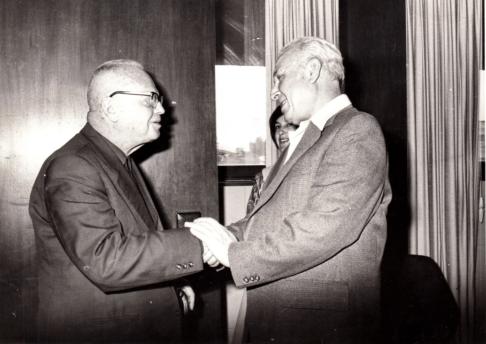 אפרים קציר, נשיא מדינת ישראל וזאב און. קבלת פנים בבית הנשיא לוותיקי תל יוסף. ירושלים - 5.7.1956